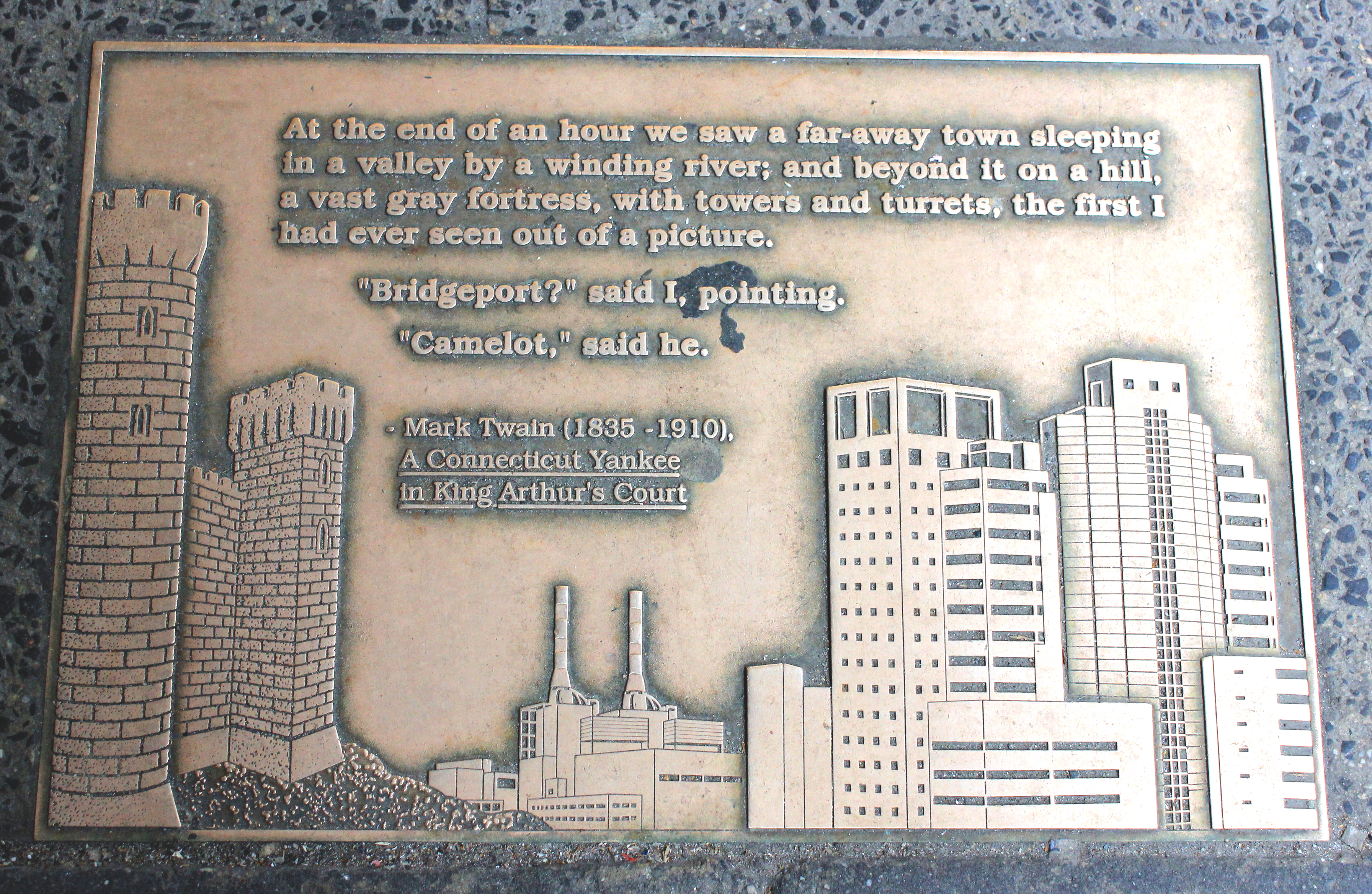 Library Walk New York City